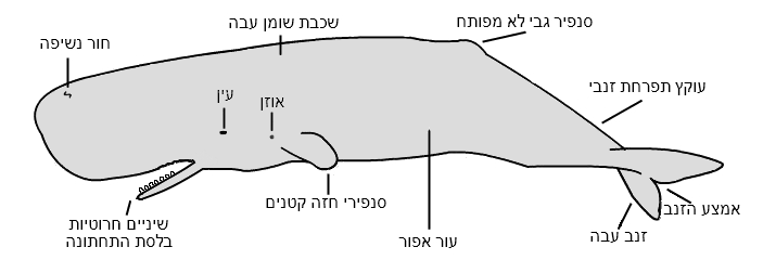 איור המתאר את מבנה גופו של הראשתן.